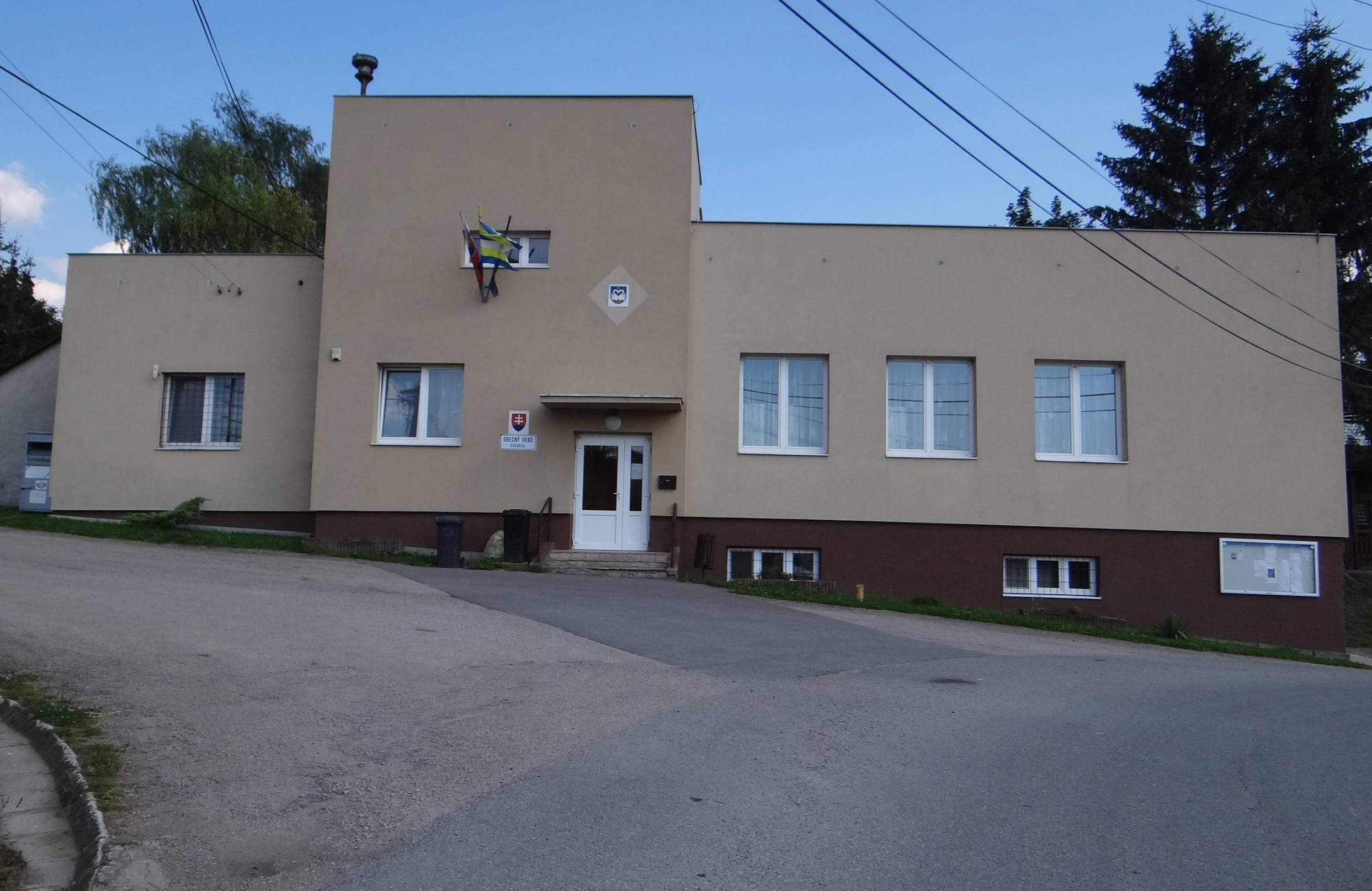 Socovce